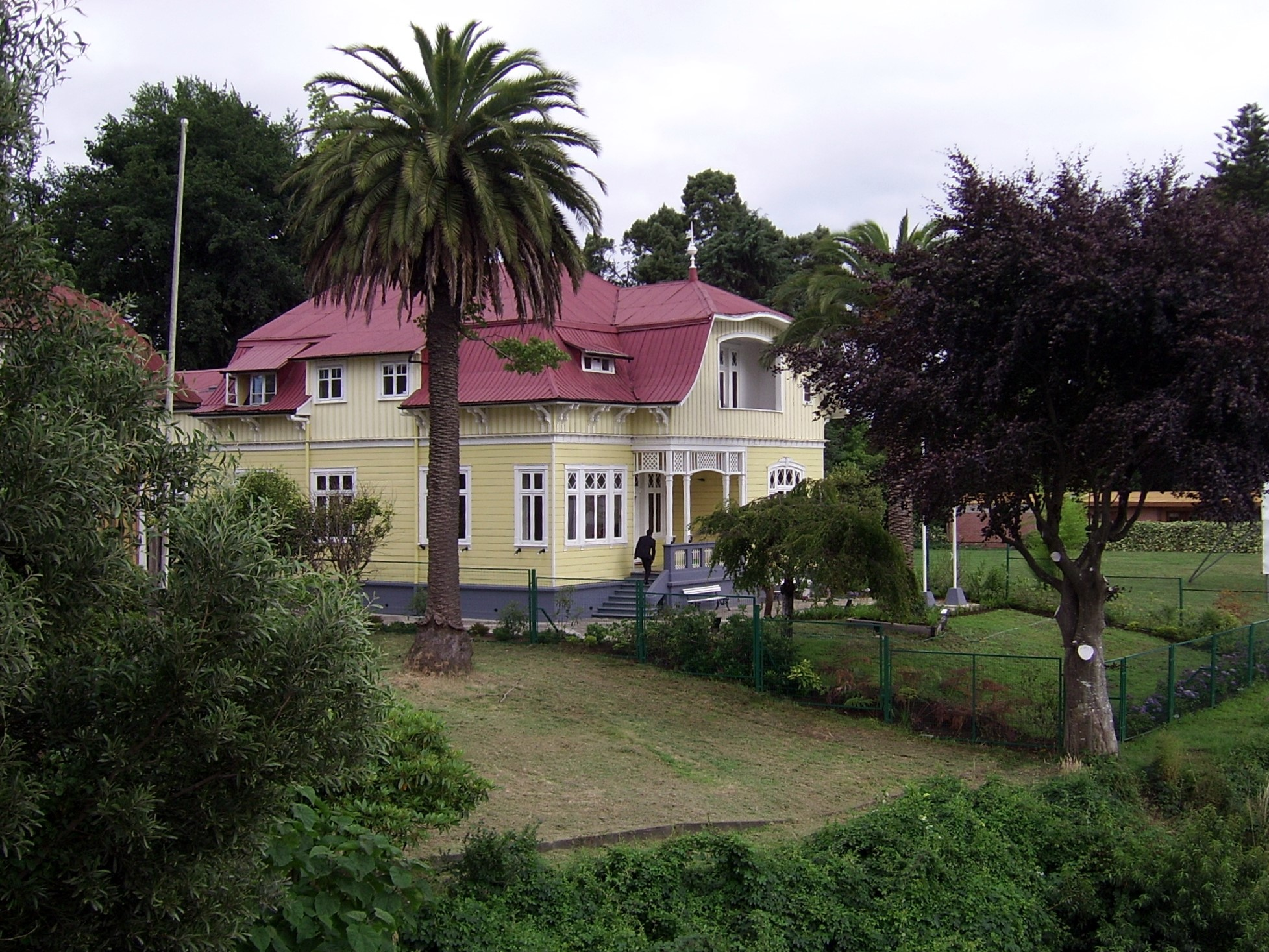 Casa Prochelle 2, sede del Consejo Regional de Los Ríos, en Valdivia, Chile. This is a photo of a national monument in Chile: 698